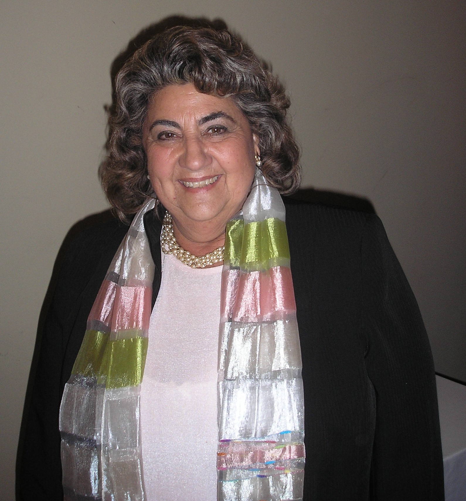 Foto de Virginia Reginato, Alcaldesa de Viña del Mar, tomada el 6 de agosto de 2008 en la Cena de Gala por los 150 años de la Cámara Regional del Comercio, en la Sala de Eventos del Casino de Viña del Mar